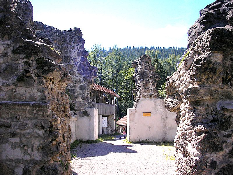 Burg Alttrauchburg (Markt Weitnau, Landkreis Oberallgäu, Bayerisch-Schwaben). Hauptburg, Blick nach Süden. Eigene Aufnahme, Juli 2007 / Alttrauchburg castle near Weitnau (Bavaria, Germany). Central castle, looking south. Own photo, July 2007